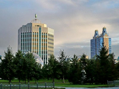 Новосибирск. Здание Сибирского филиала банка Сбербанк России